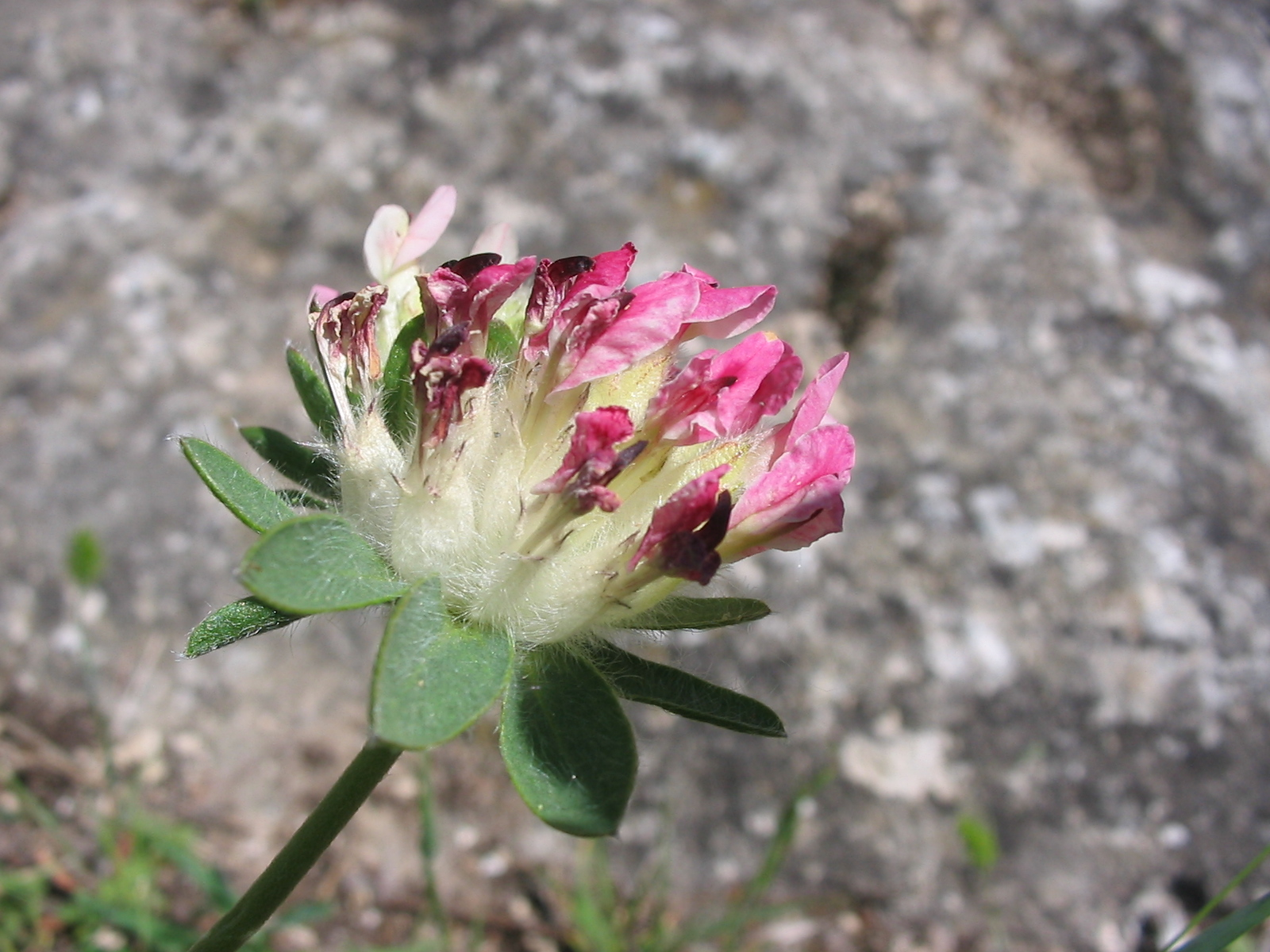 Anthyllis vulneraria subsp. maura